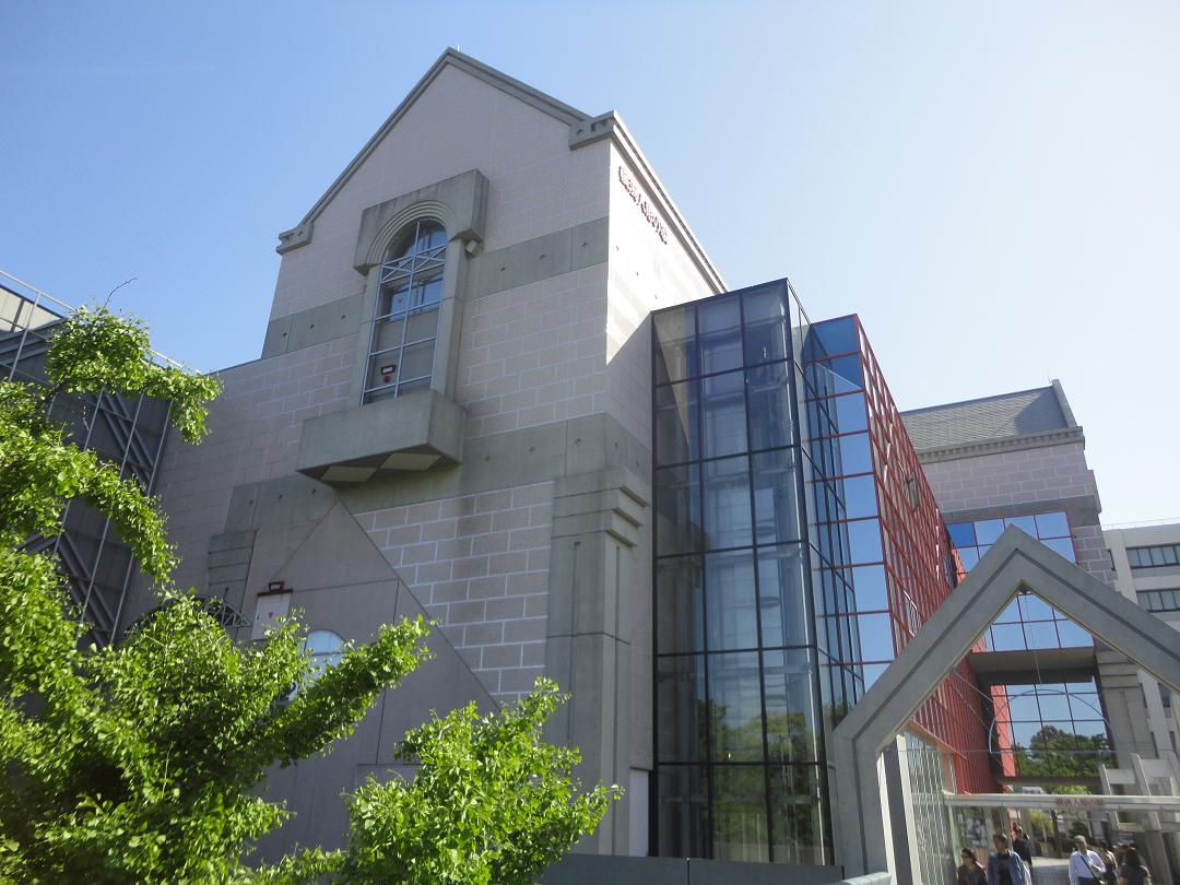 横浜人形の家